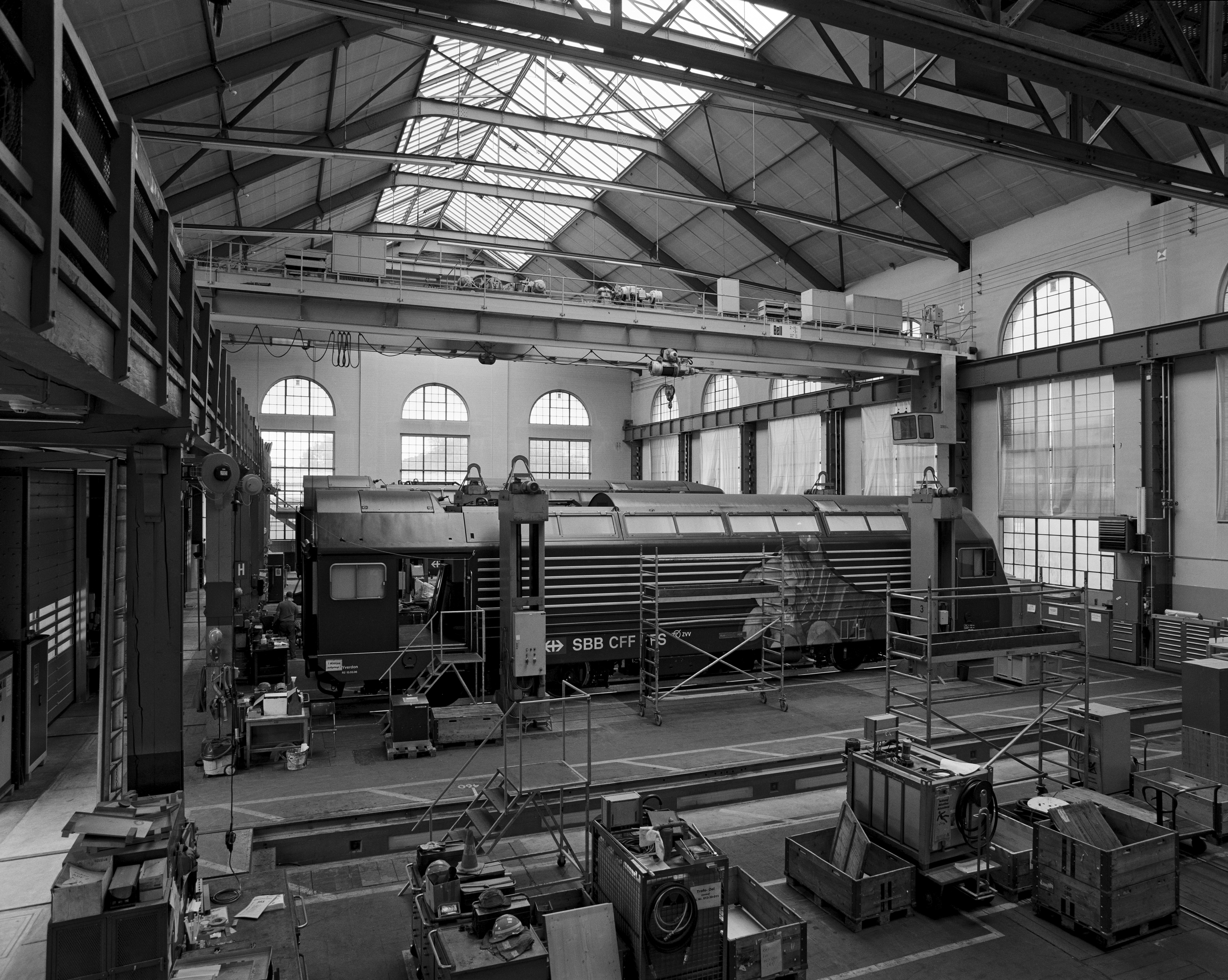 SBB, Lokomotivreparaturwerkstätte, SBB-Zentralwerkstätten, Hohlstrasse, Zürich, Schweiz: Baujahr 1909